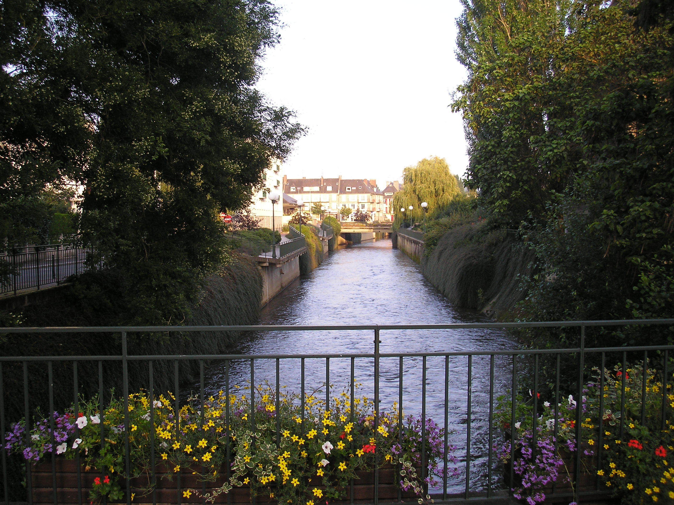 Condé-sur-Noireau (Normandie, France). La Druance à son arrivée dans le centre-ville.